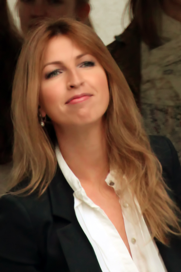 Maarja-Liis Ilus esinemas Tallinnas Harjumäel.